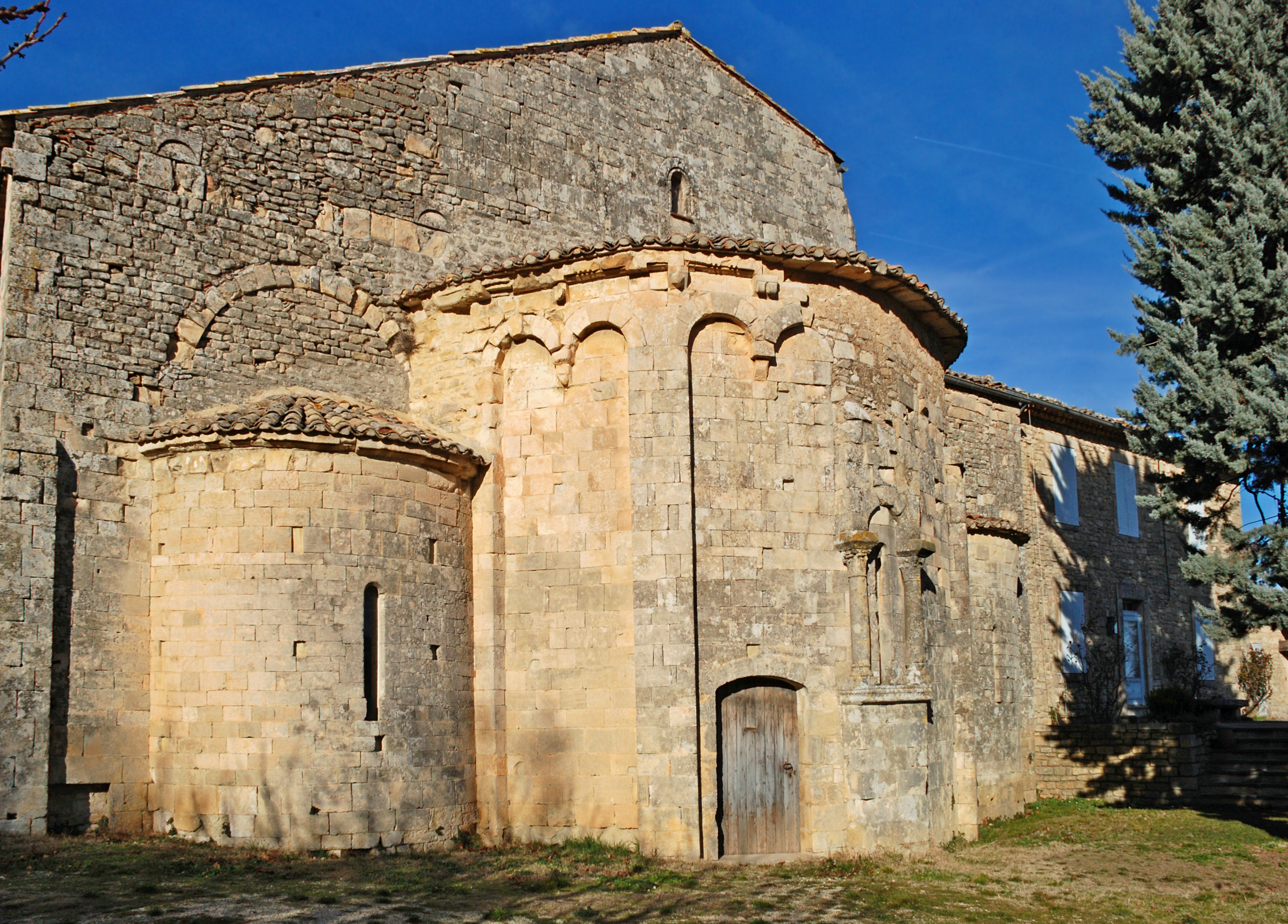 France - Vaucluse - Saignon - Abbaye Saint-Eusèbe